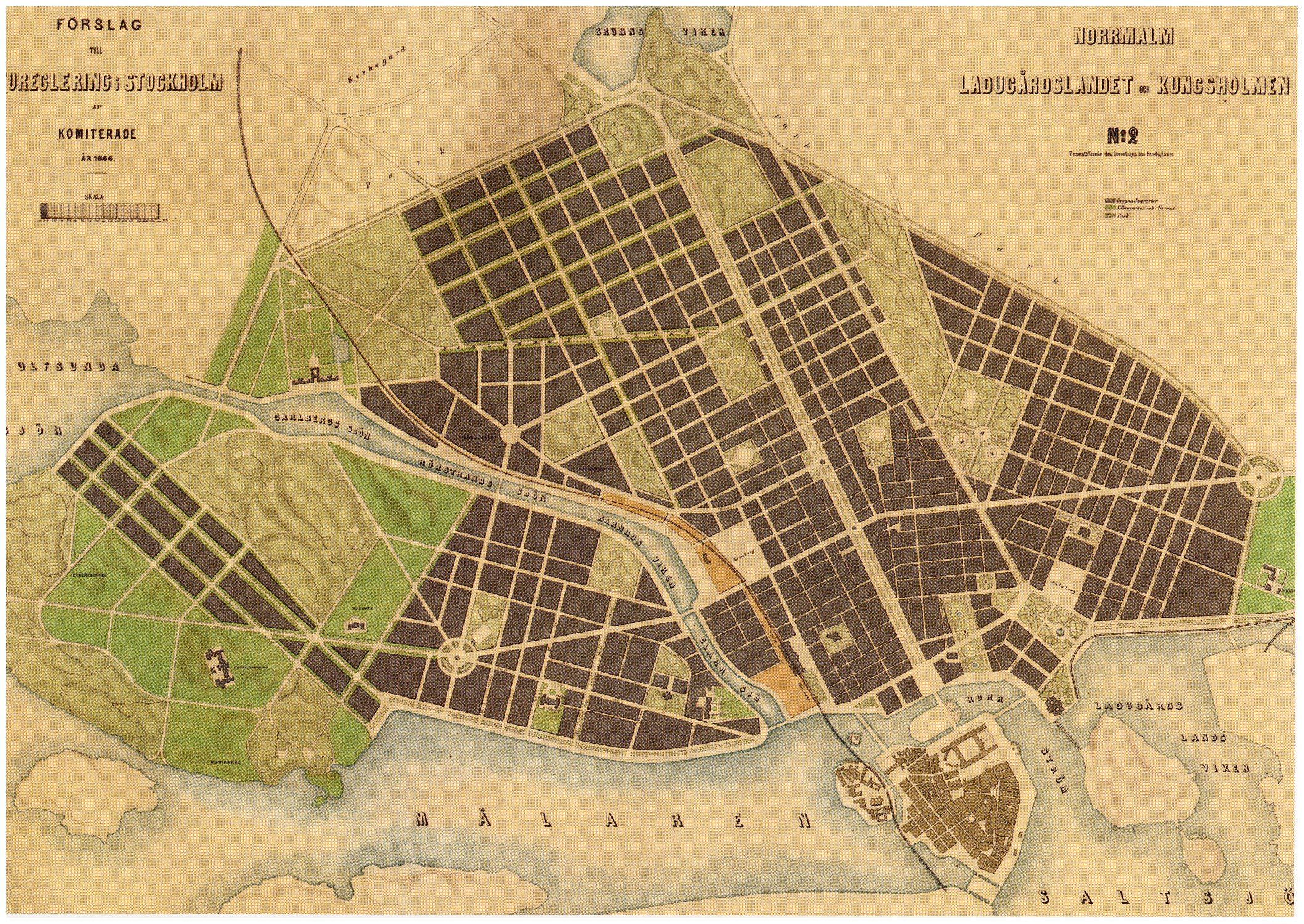 Albert Lindhagens plan för Norrmalm och Kungsholmen i Stockholm år 1866